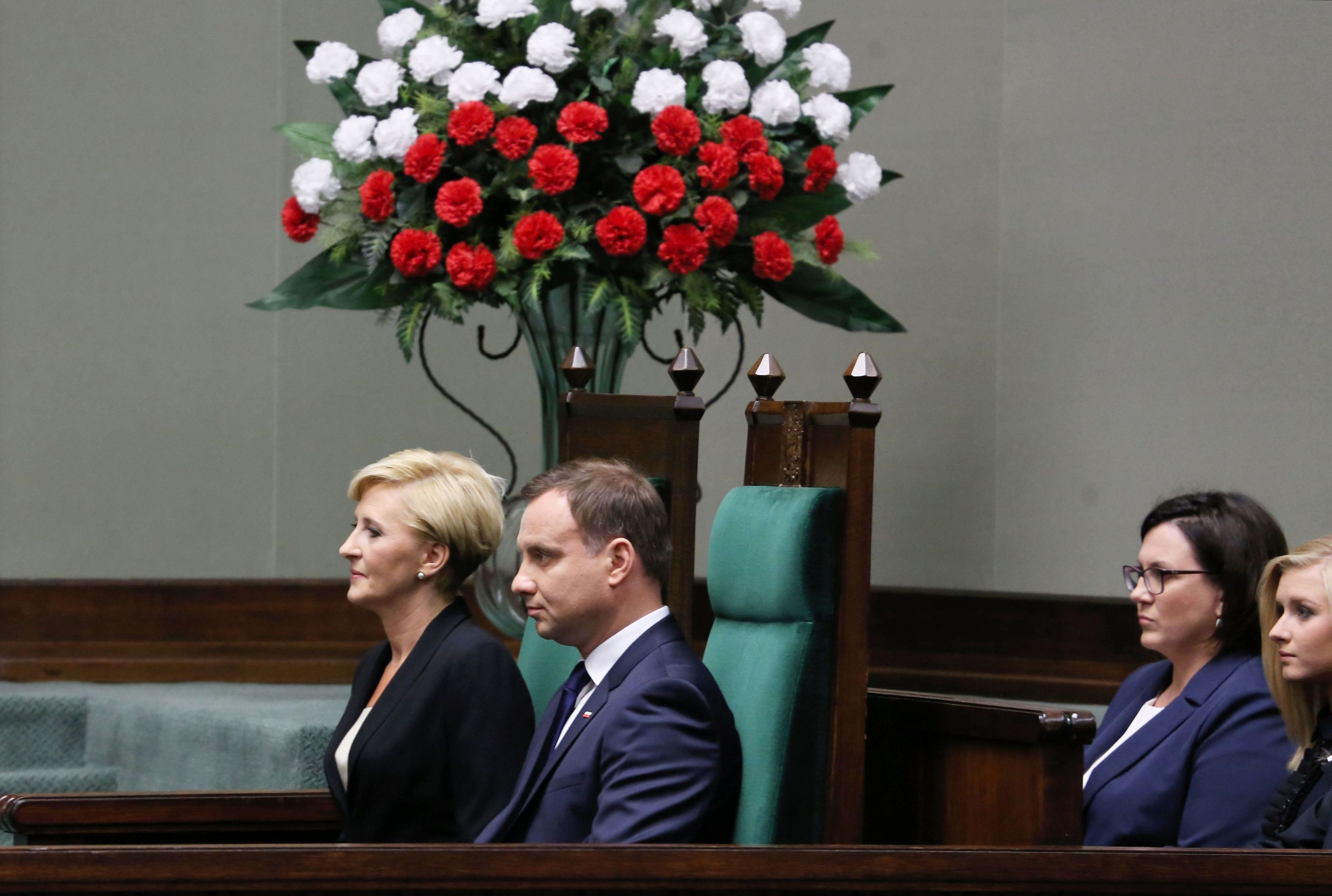 Andrzej Duda i Agata Kornhauser-Duda podczas Zgromadzenia Narodowego zwołanego w celu odebrania przysięgi od nowo wybranego prezydenta